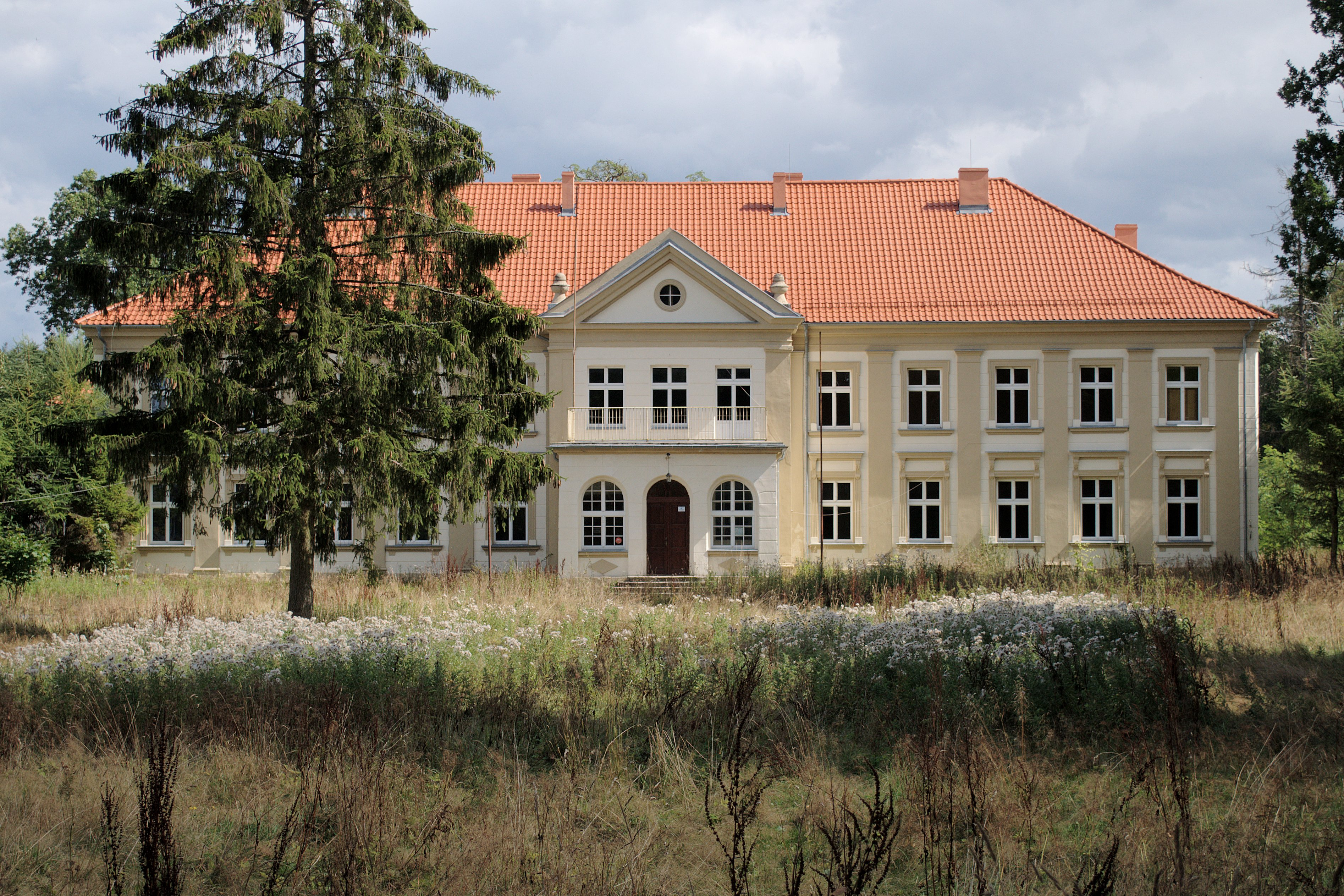 Karznica, pałac, 2 poł. XIX